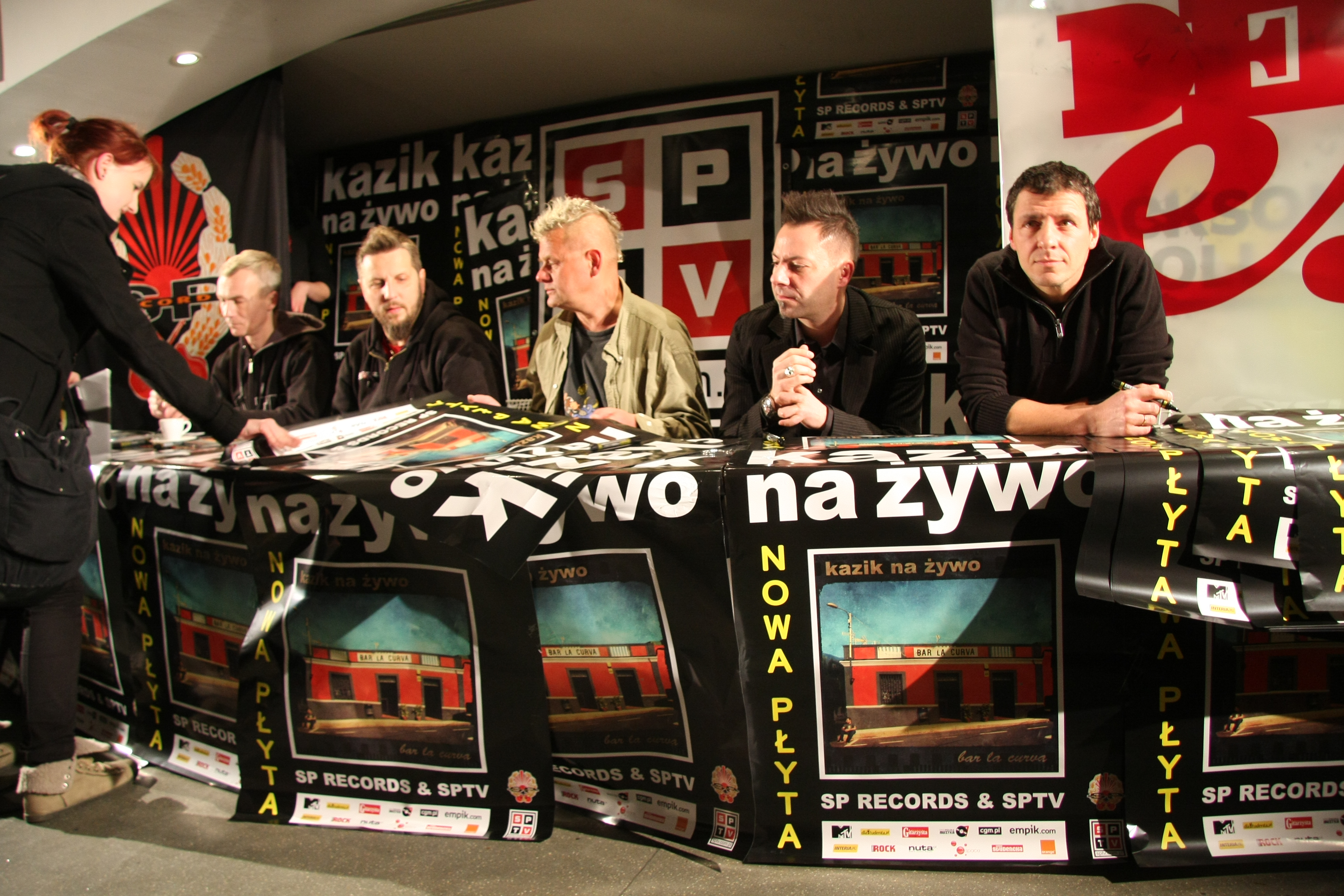 Członkowie zespołu Kazik na Żywo w czasie podpisywania płyty Bar La Curva / Plamy na słońcu 5 grudnia 2011 roku w warszawaskim Teatrze Rozmaitości